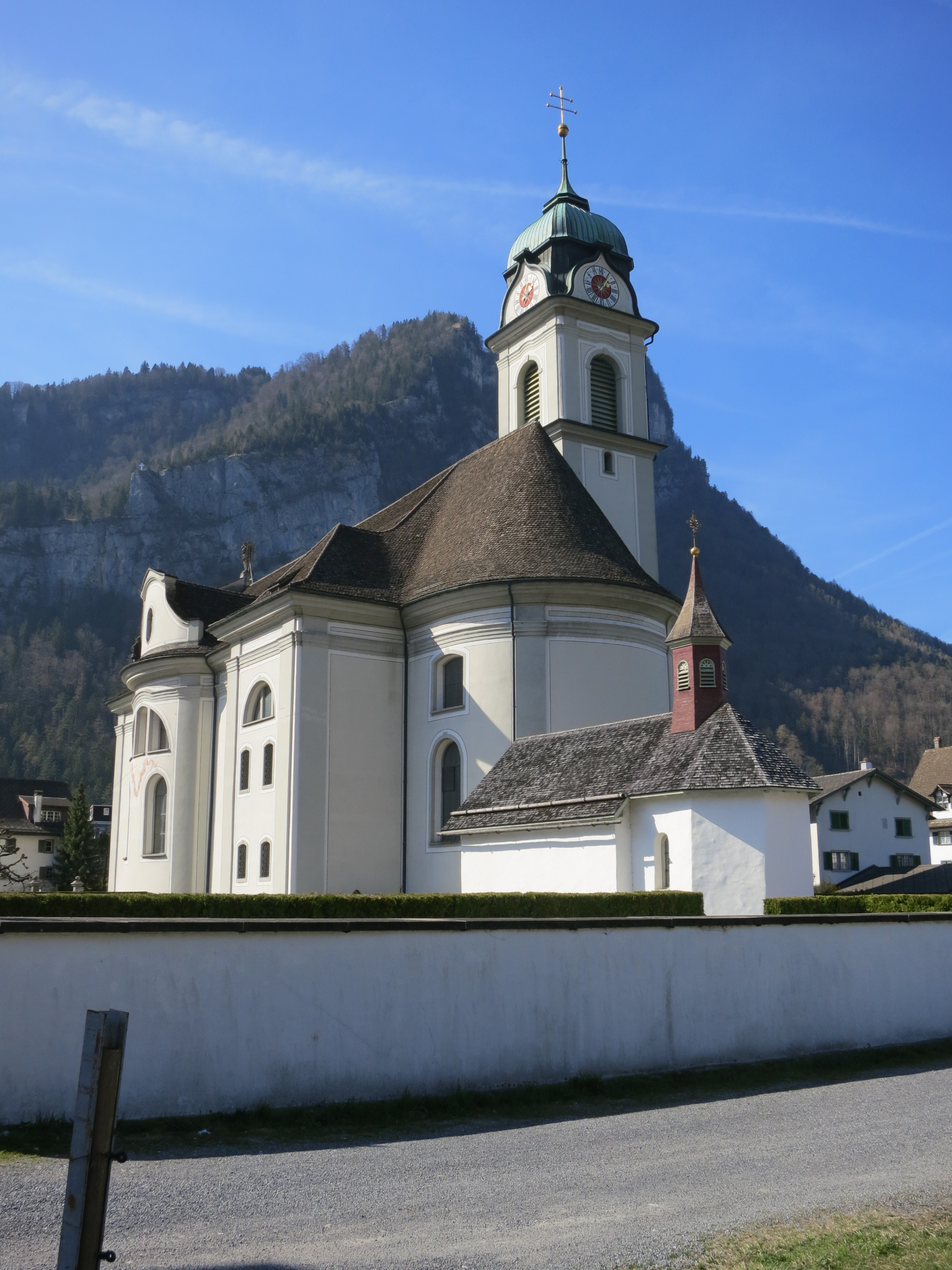 Kirche, Näfels GL, Schweiz